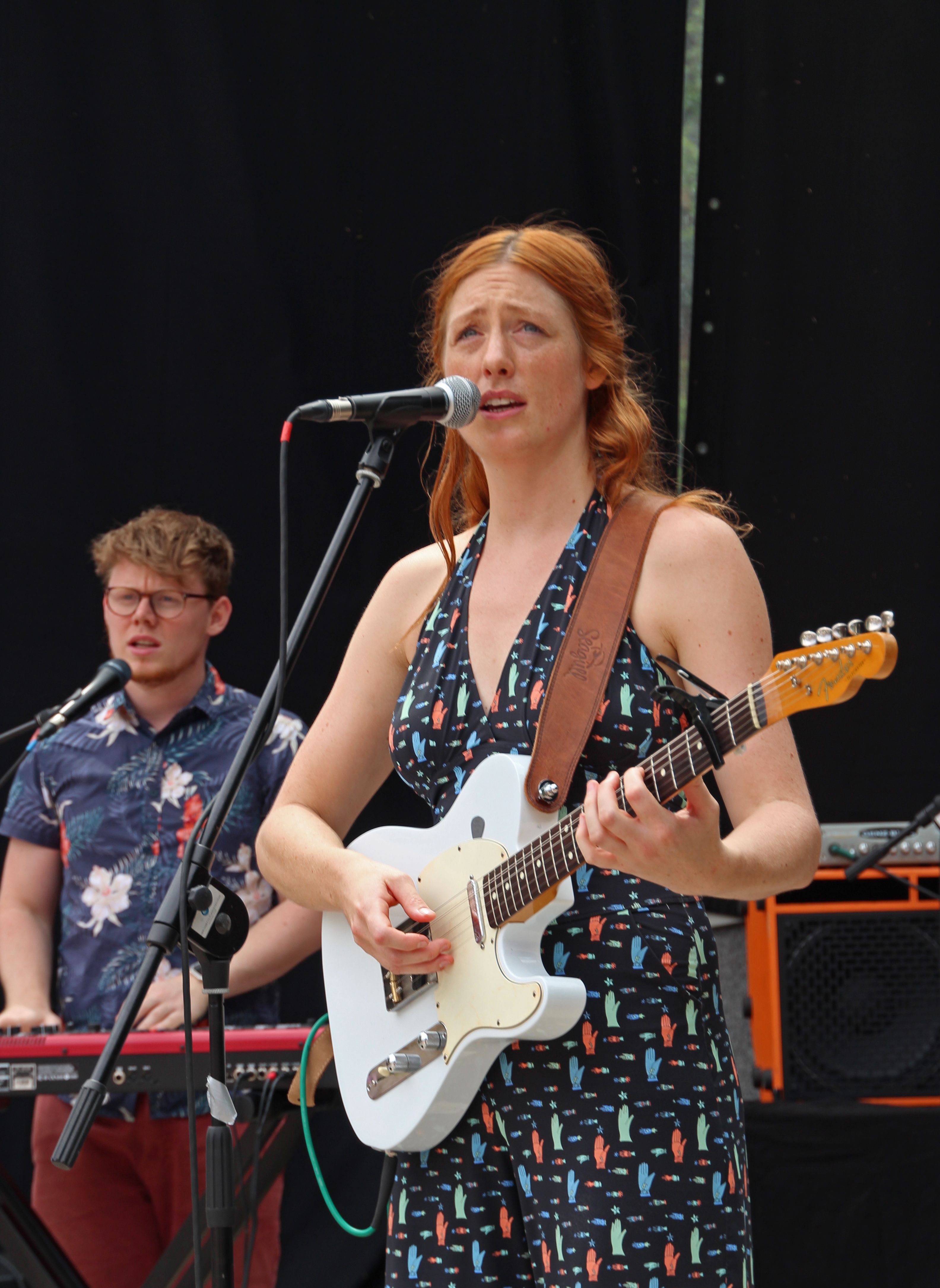 Bildinhalt: Teresa Bergman bei den 23. Jazztagen Idar-Oberstein 2018. Aufnahmeort: Idar-Oberstein, Deutschland Die dargestellte Person wurde bei einem öffentlichen Auftritt fotografiert.